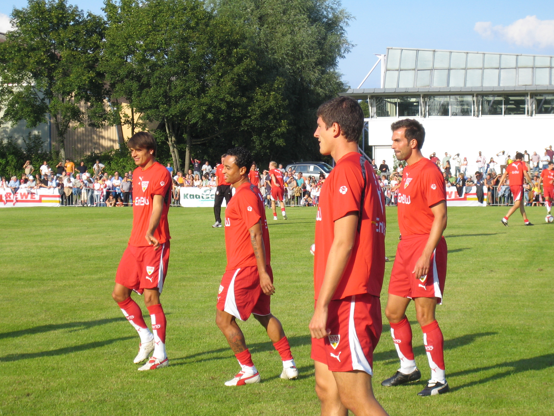 Bei einem Testspiel in Wernau